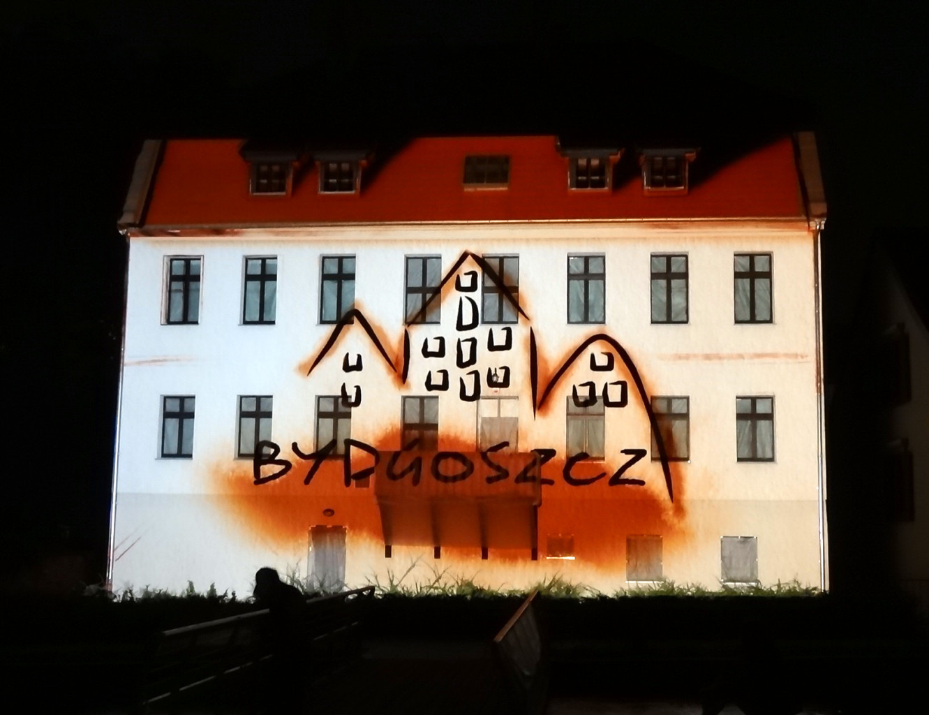 Spektakl światło&dźwięk na Wyspie Młyńskiej w Bydgoszczy